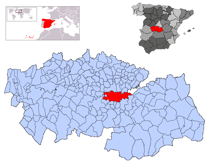 Toledo en la provincia de Toledo